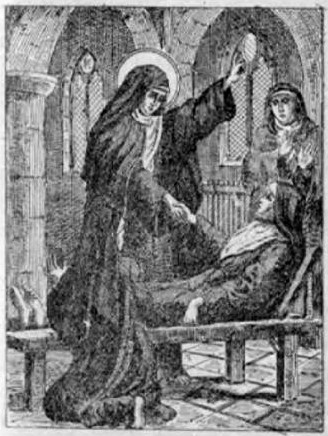 Image de la page 191 de la "Vie des Saints" en langue bretonne. Écrit par Yann-Vari Perrot et publié en 1912.